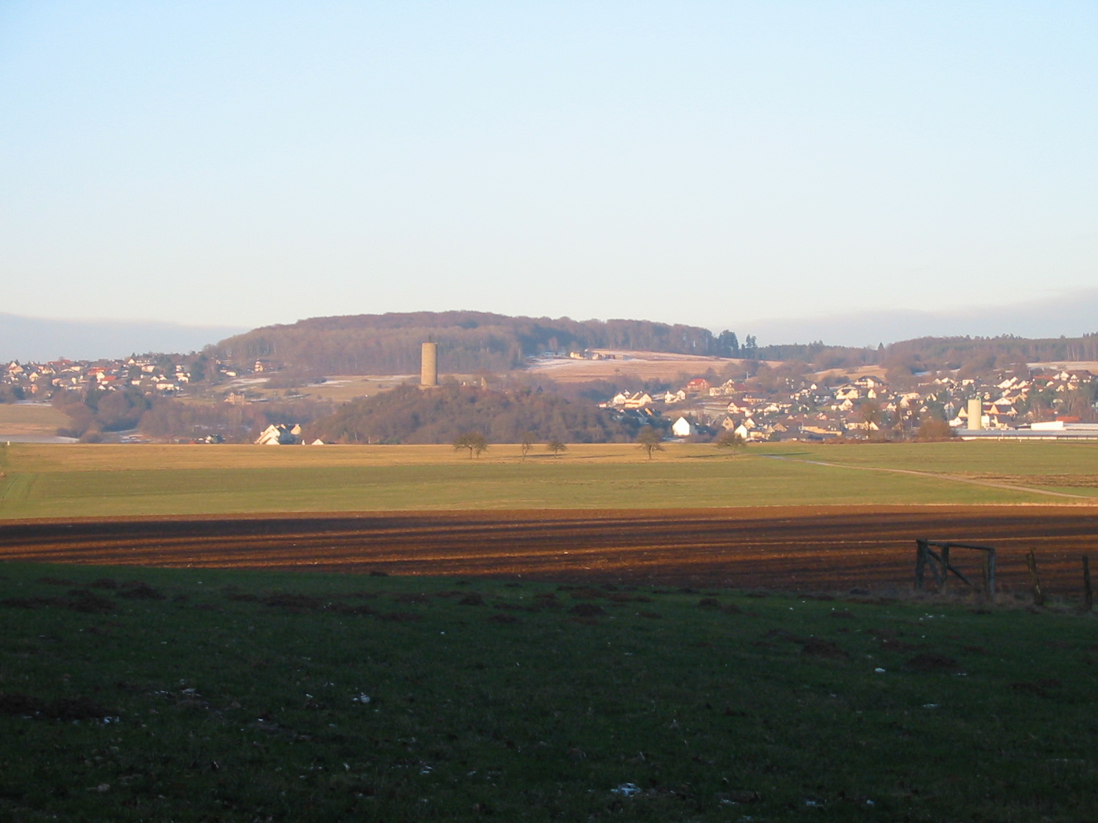 Der Ort Hartenfels mit dem Burgbergs